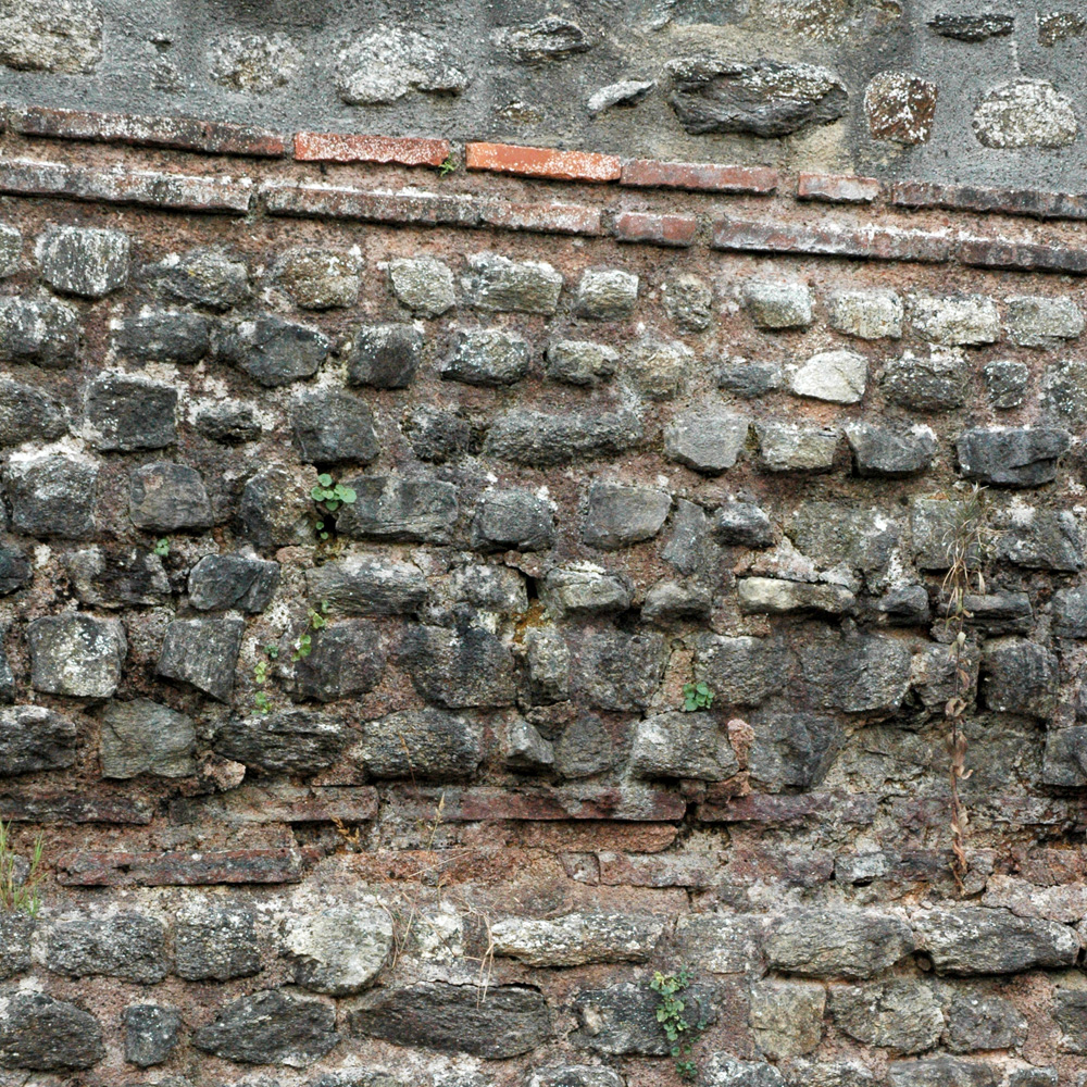 Opus mixte - Détail du château de Brest